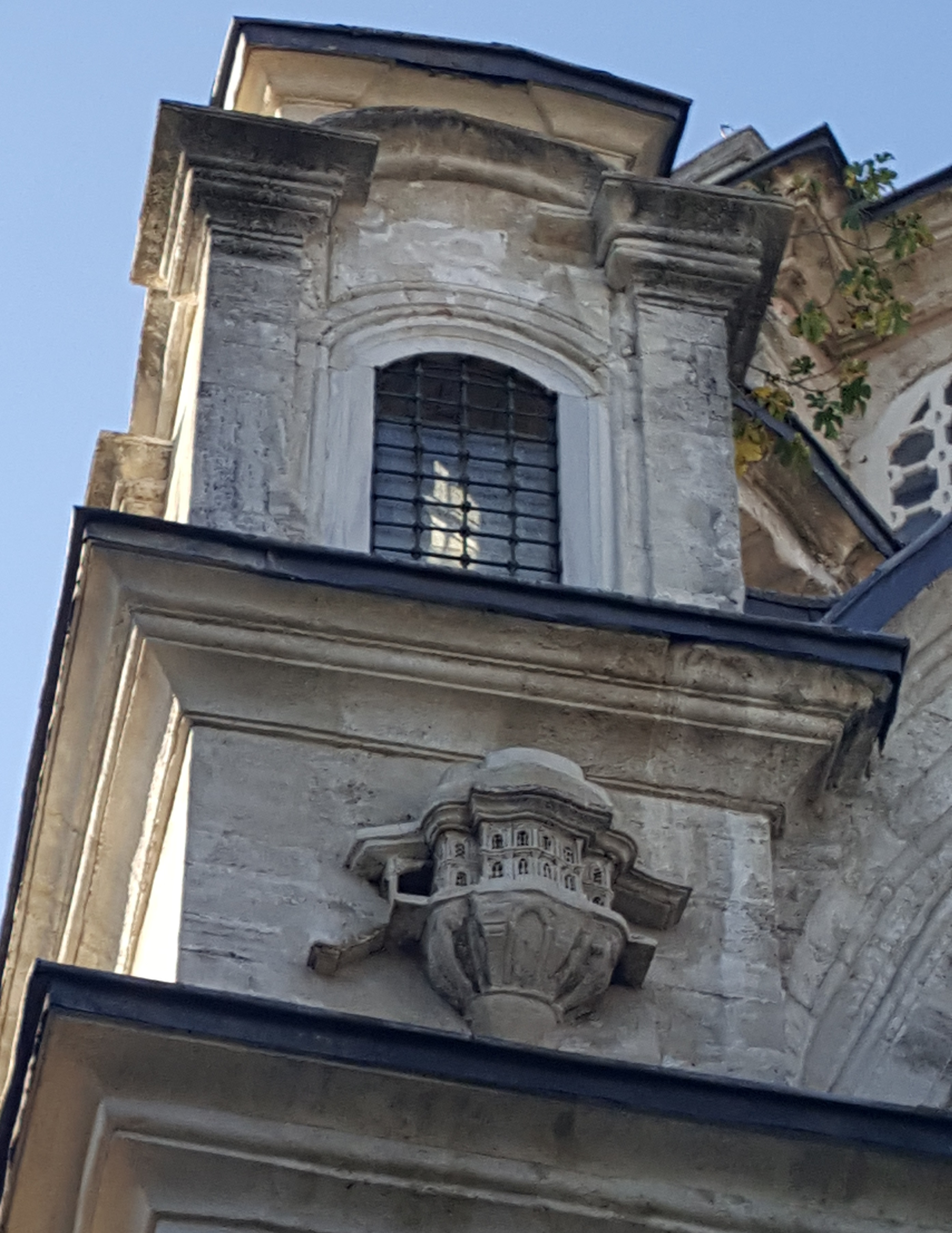 Büyük Selimiye Camisi kuşevi, Üsküdar, İstanbul